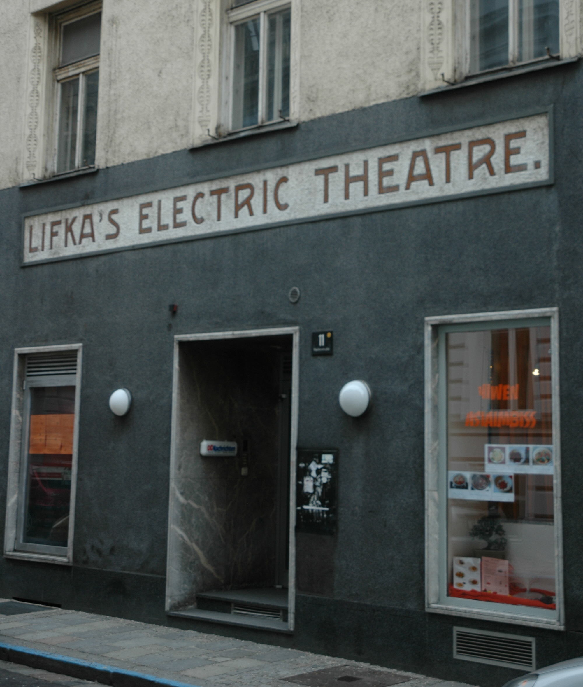 Das ehemalige "Lifka Kino" in Linz, Waltherstraße (direkt neben Lokal "Cheeese"). Eröffnet 1908 als "Lifka's Electric Theatre" als erstes Kino der Stadt.